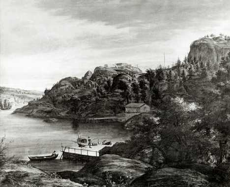 Skansen, Sponvika, Berg, Halden, Østfold. Fotografi av maleri, kunstner Jacob Conning Tilhører Norsk Folkemuseum